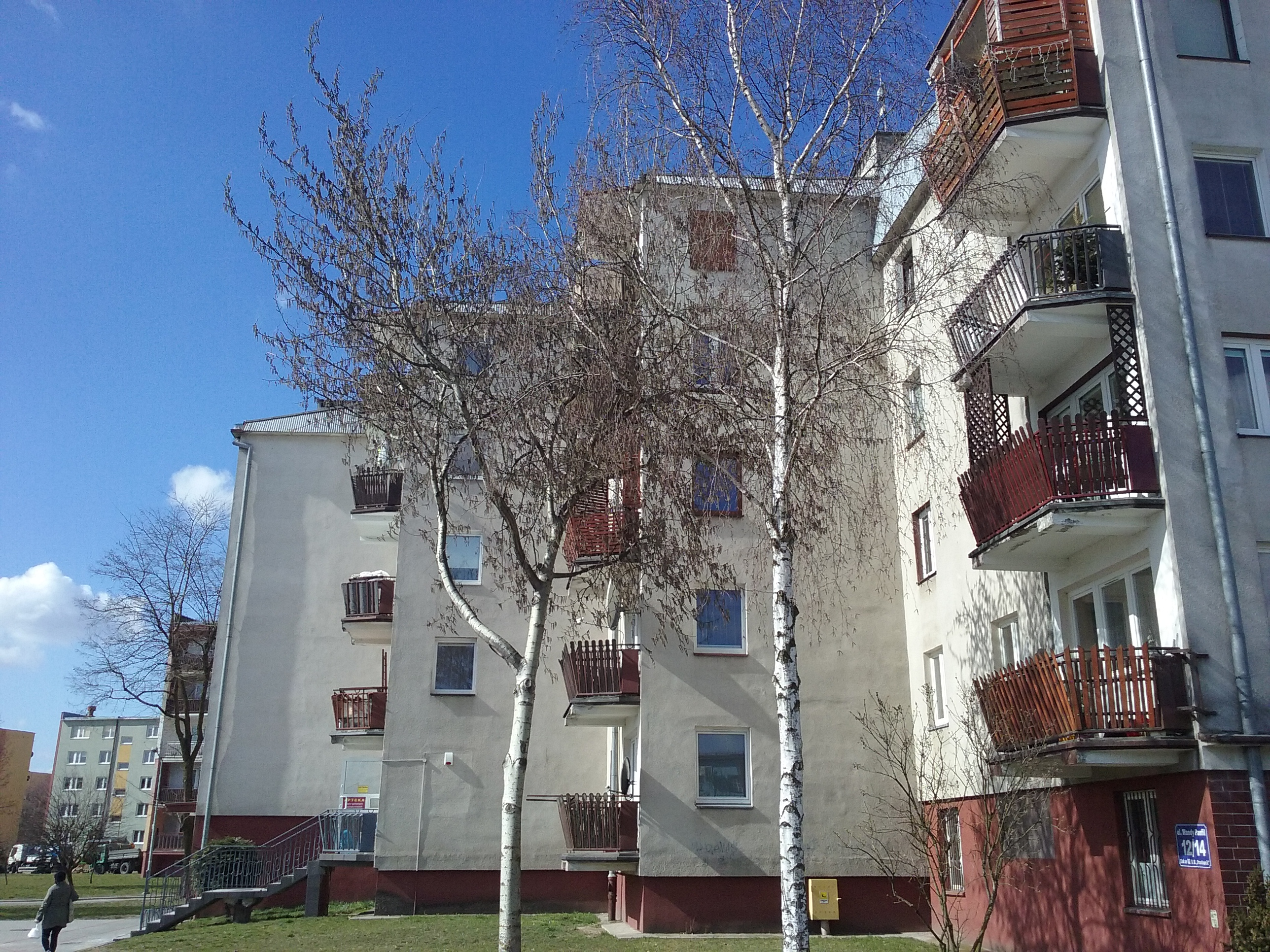 Budynki mieszkalne Spółdzielni Mieszkaniowej Przodownik w 60-tysięcznym Tomaszowie Mazowieckim, w województiwe łódzkim, PL,EU,CC0